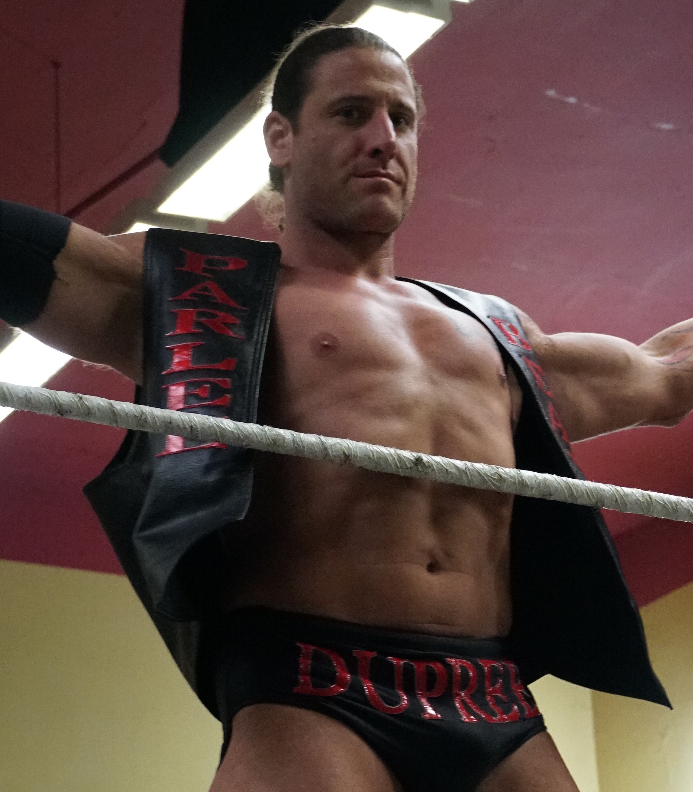 Superstar Wrestling - Chapelle-Lez-Herlaimont - Renee Dupree Vs Rob Raw Renee Dupree def. (Pin) Rob Raw ( La Superstar Wrestling debarque pour la premiere fois a Chapelle-Lez-Herlaimont pour un show de catch qui s'annonce ENORME!!! Au programme: - 6 combats professionels - Plus de 12 catcheurs - Sons et lumieres - Stand merchandising - Dedicace )